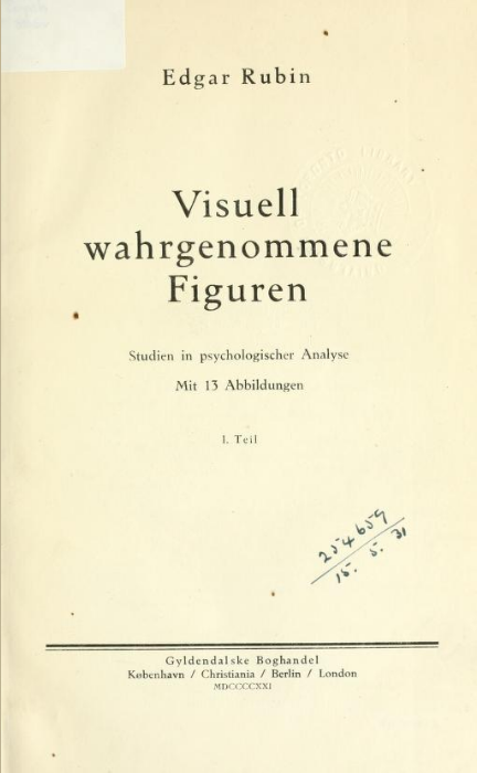 Tesi d'Edgar Rubin sobre les figures visuals presentada l'any 1915 i traduïda el 1921